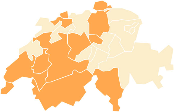 Die regionalen SAH-Vereine (Schweizerisches Arbeiterhilfswerk) in der Schweiz